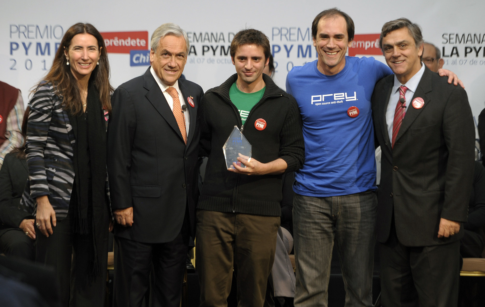 05-10-2012 Entrega de los Premios Pyme 2012